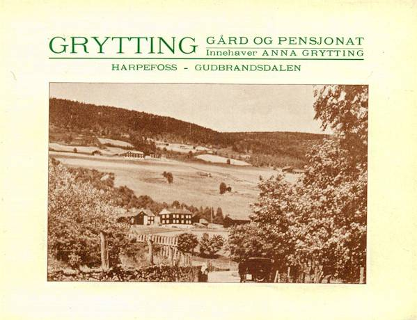 Brosjyre Grytting pensjonat